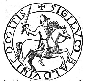 Balduin V. Flanderský